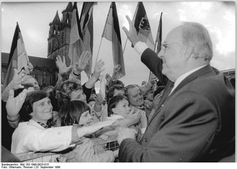 Magdeburg, CDU-Wahlkundgebung, Helmut Kohl ADN Thomas Uhlemann 15 23.9.90 Magdeburg: Wahlkundgebung mit Kohl. Zehn Tage vor der deutschen Einheit jubelten auf dem Magdeburger Domplatz einige zehntausende Menschen Helmut Kohl zu. Auf einer Wahlkundgebung der CDU von Sachsen-Anhalt betonte der Bundeskanzler, der gemeinsam gehegte Traum vom einig Vaterland gehe nun in Erfüllung. Abgebildete Personen: Kohl, Helmut: Bundeskanzler, Ministerpräsident von Rheinland-Pfalz, CDU, Bundesrepublik Deutschland (GND 118564595)